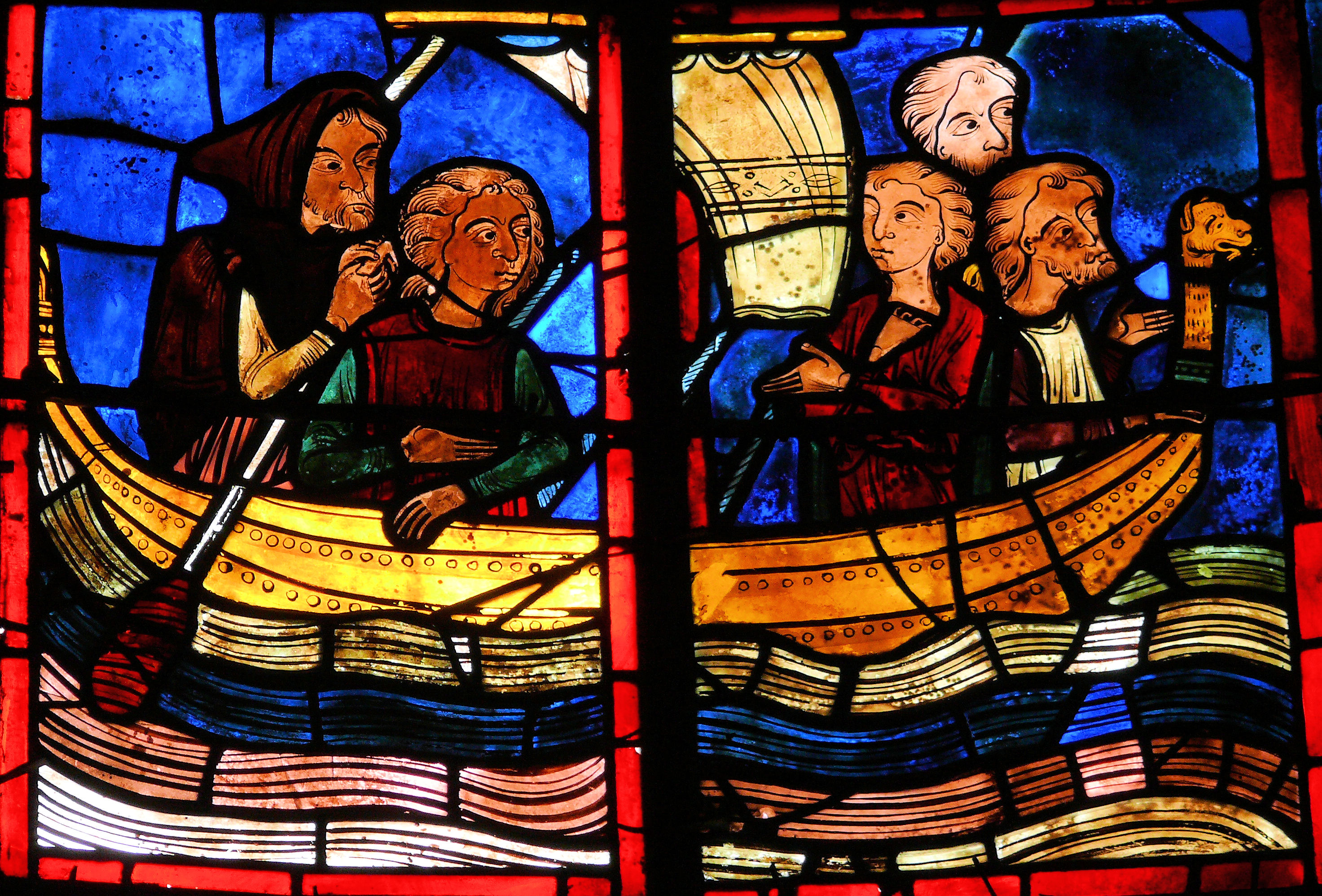 Bourges - Cathédrale - Déambulatoire - Verrière de la légende de Marie l'Égyptienne